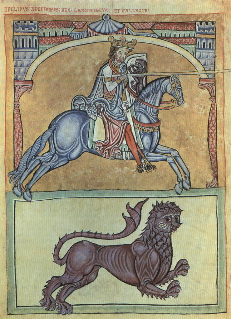 Miniatura románica onde se ilustra a Afonso VIII de Galicia e León